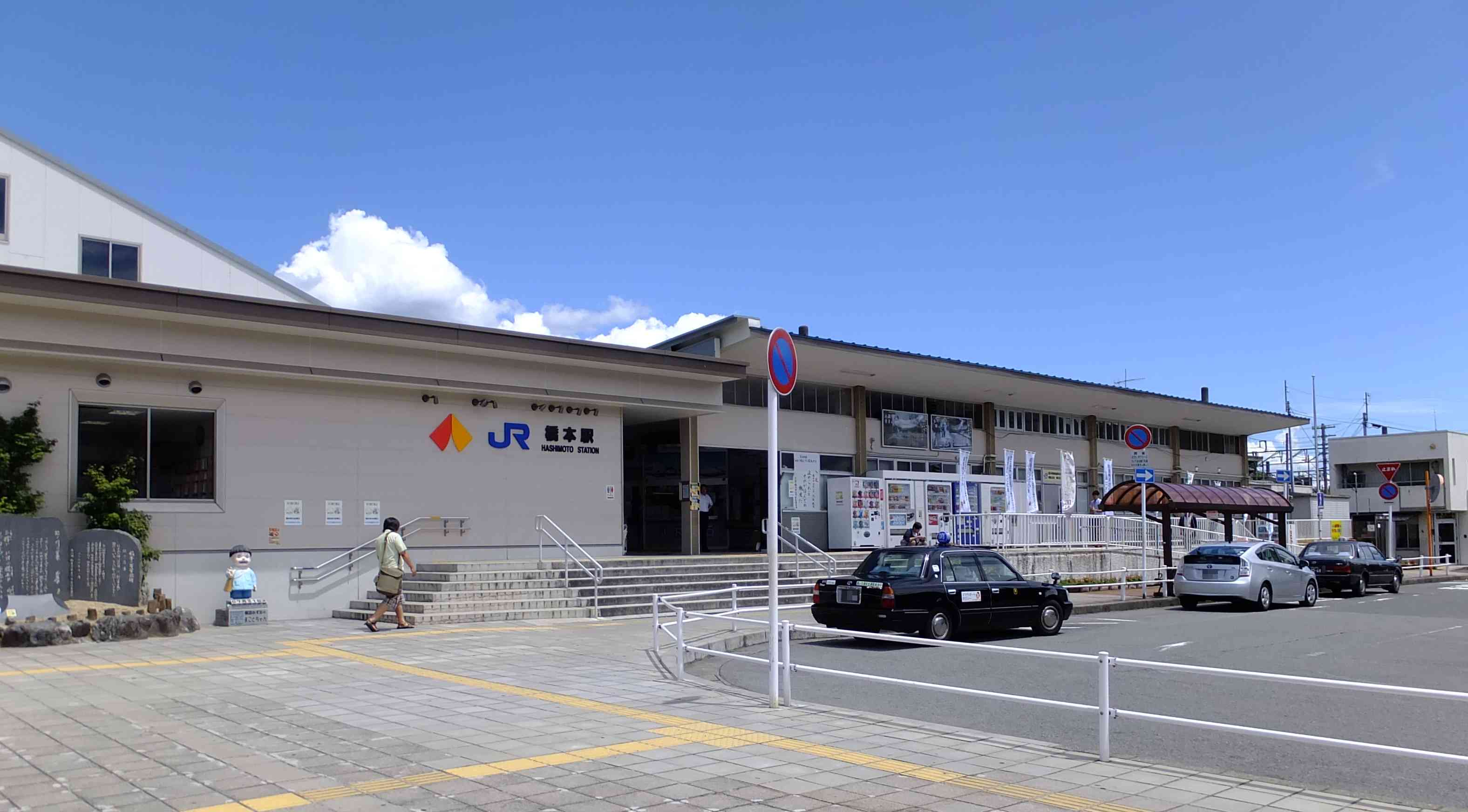 橋本駅 駅舎